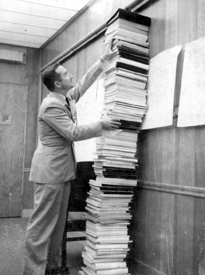 Missile "B" (later MGM-52 Lance) proposals